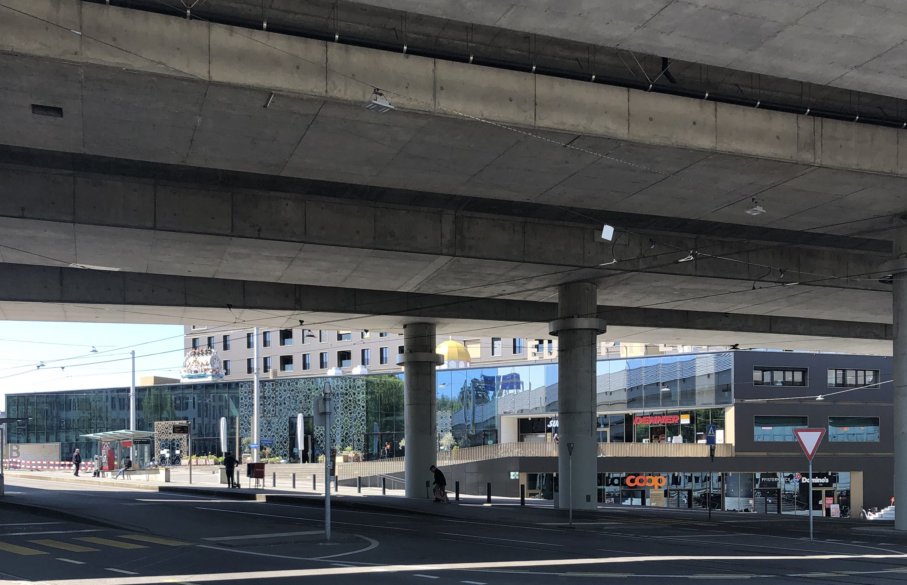 Europaplatz Blick unter der Autobahnbrücke hindurch